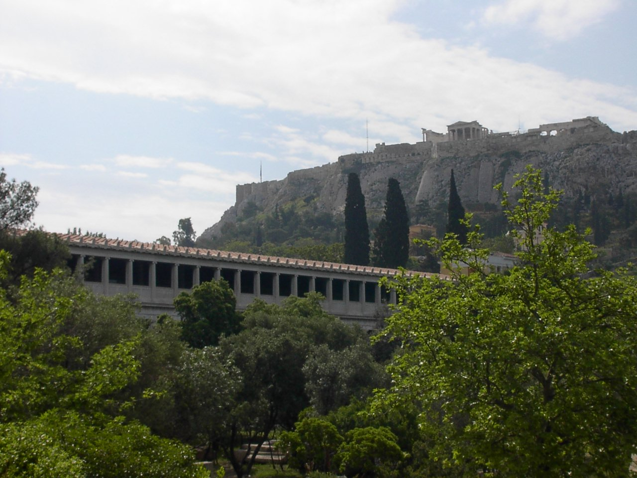 Akropolis i Athen set fra nord med den restaurerede Stoa fra Attalus i forgrunden.